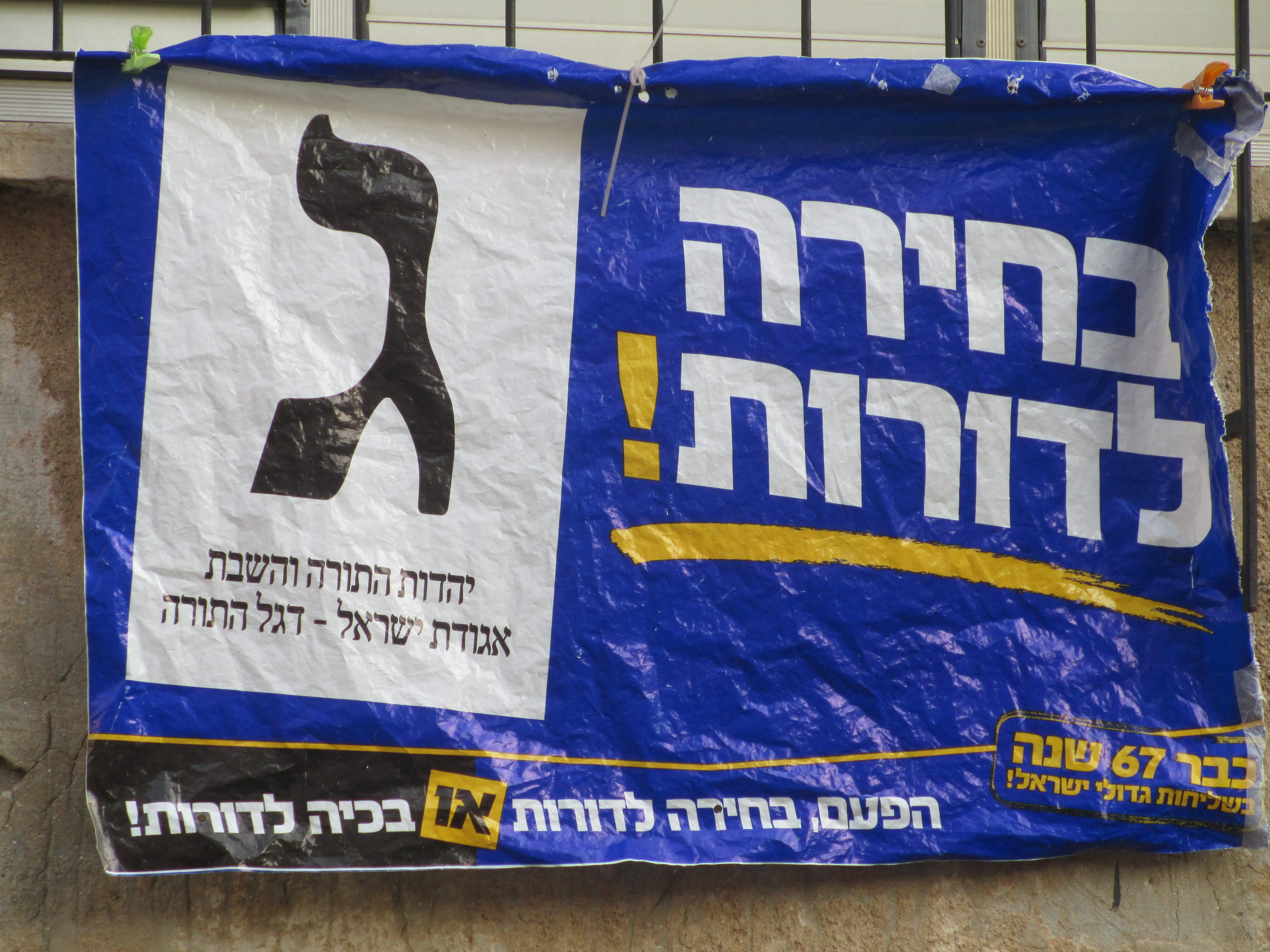 כרזת בחירות של אגודת ישראל, בחירות 2015